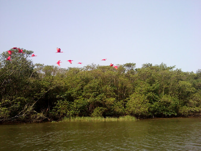 Revoada de guarás no Mar Pequeno.